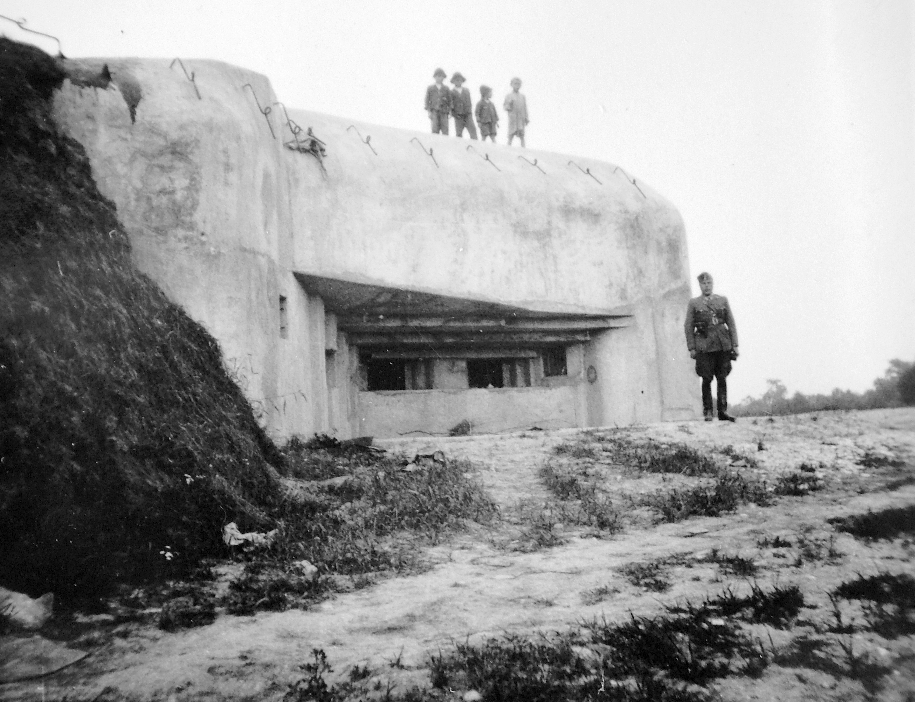 a Károly (Carol) vonal kétszintes nagyerődje. Location: Romania, Transylvania, Nojorid Title: a Károly (Carol) vonal kétszintes nagyerődje.